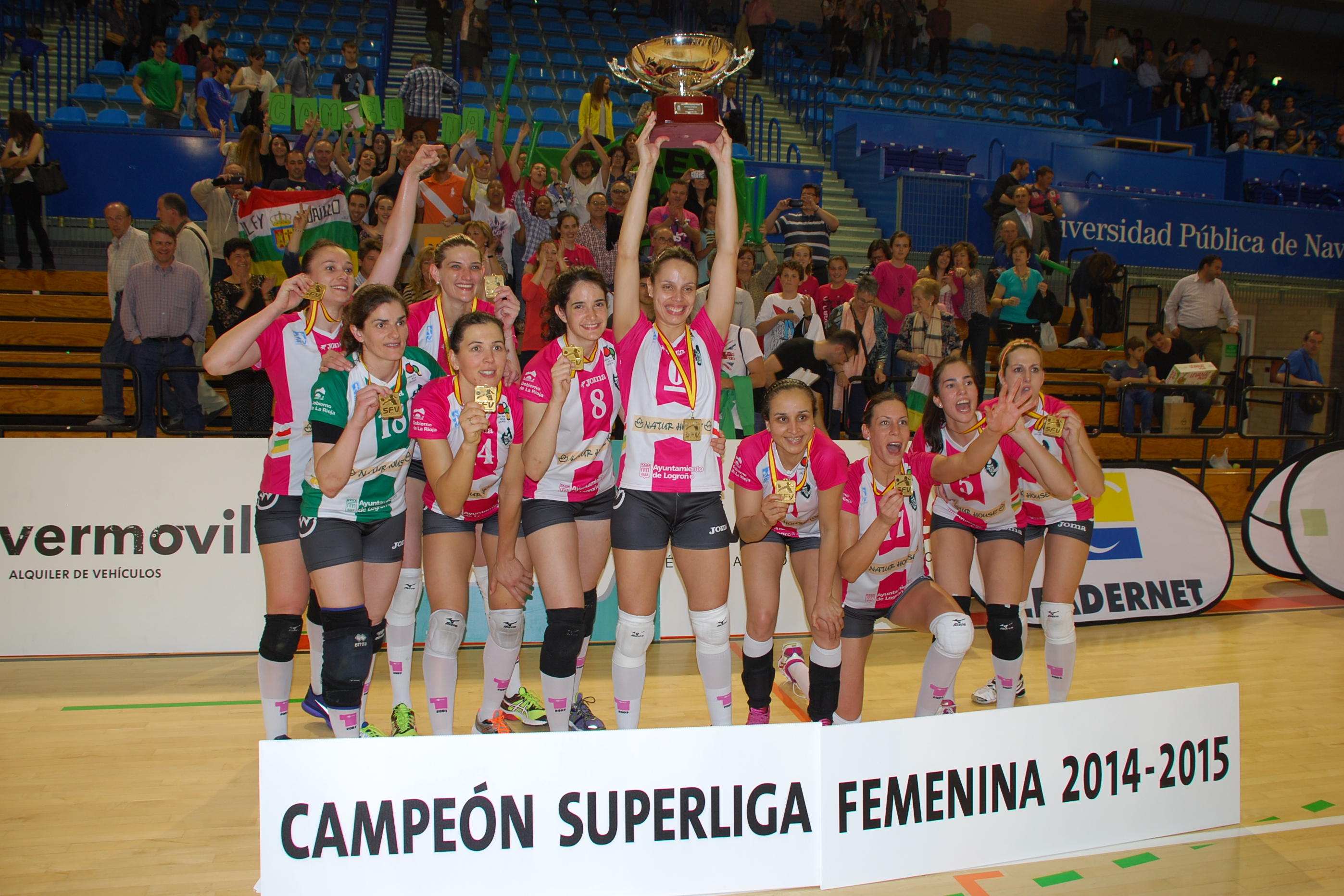 Naturhouse Ciudad de Logroño - Campeón de Superliga 2014-2015